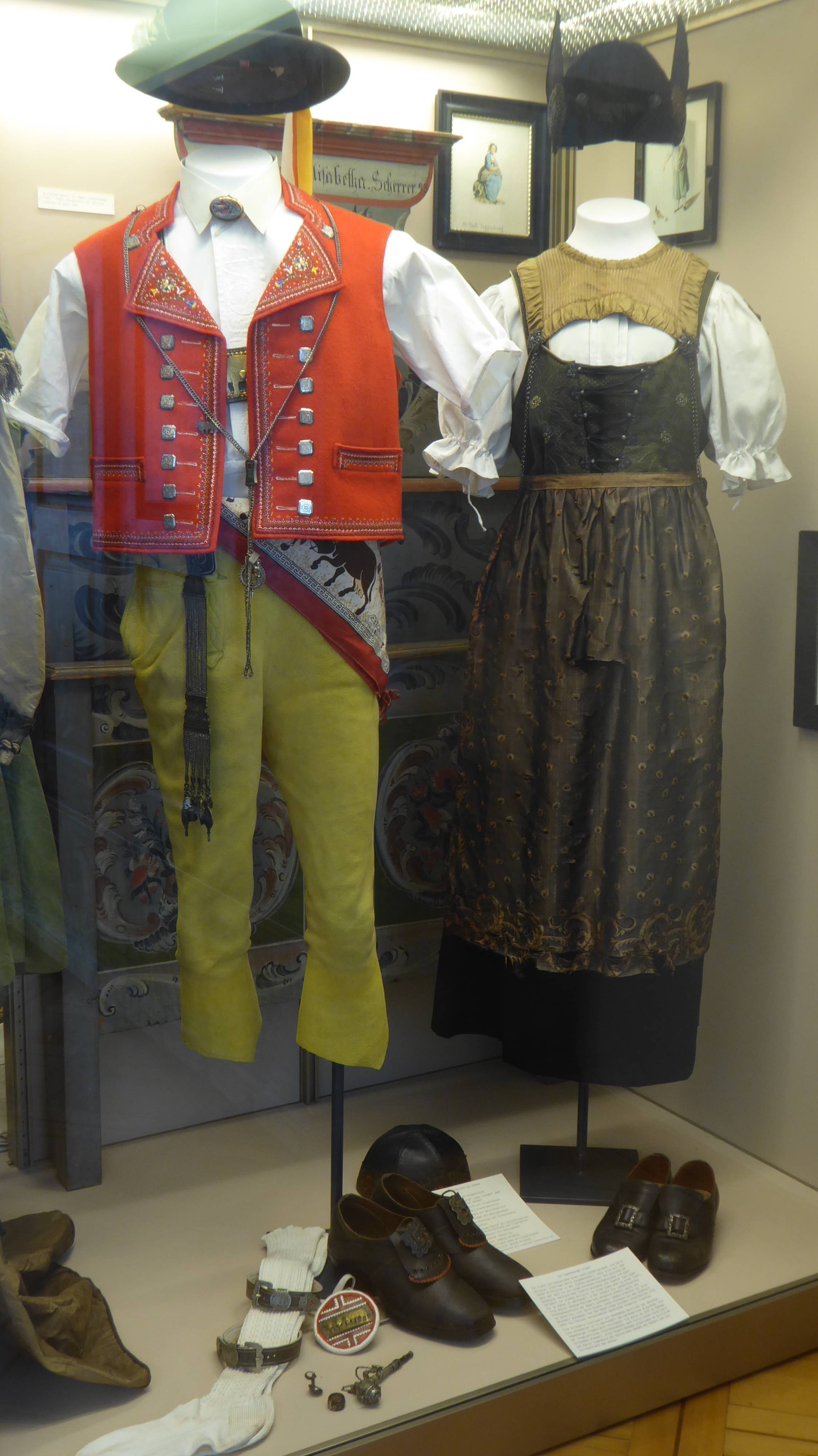 Toggenburger Festtagstracht des Sennen und Toggenburger Sonntagstracht